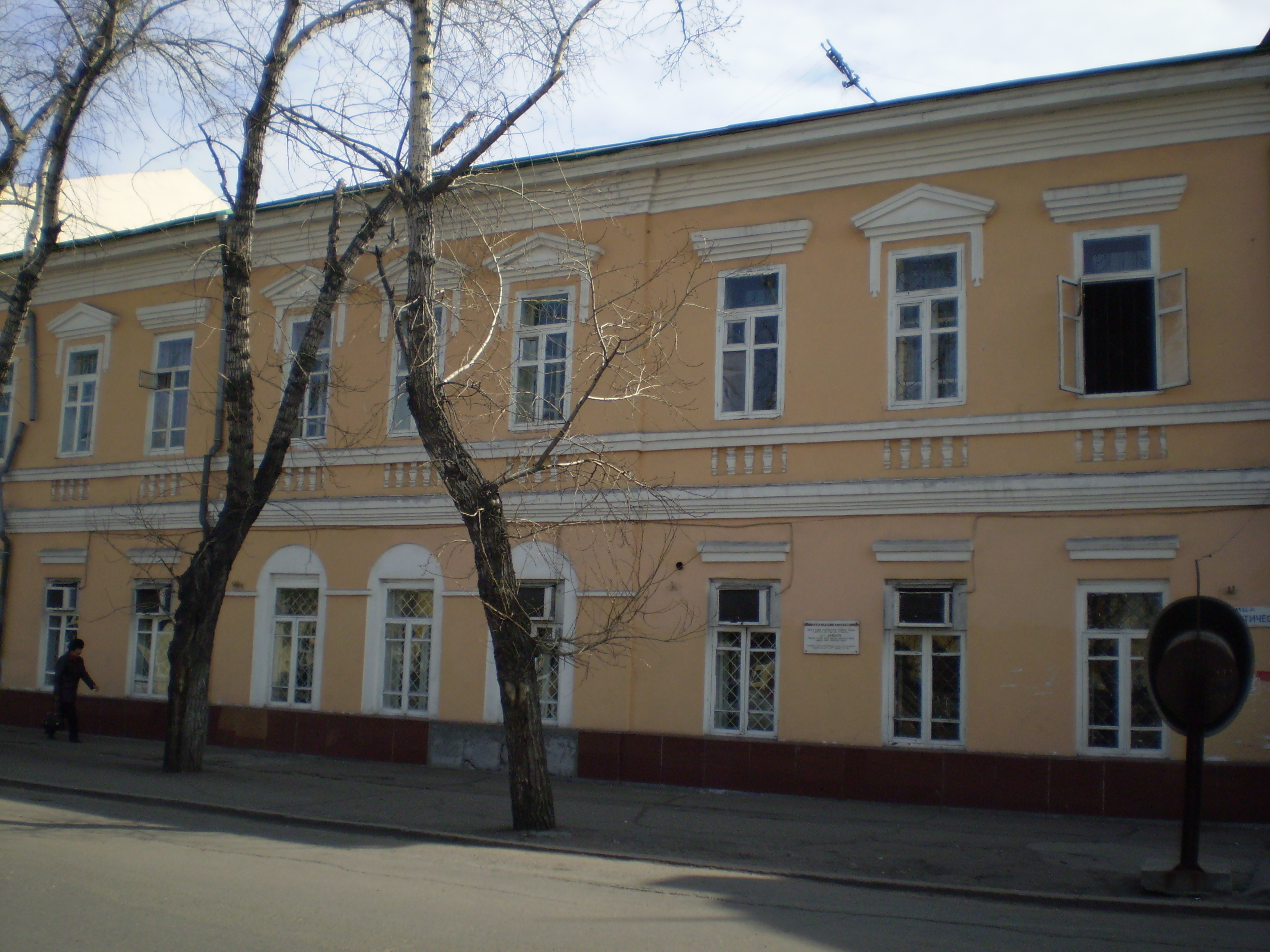 Улица Коммунистическая 16. Здание Верхнеудинского уездного училища. Памятник истории.